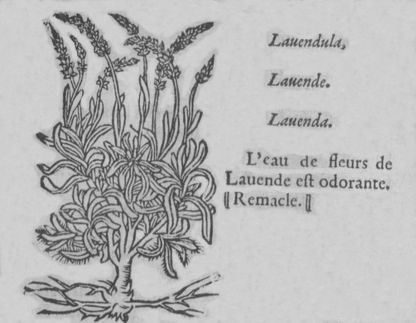 Lavande (tresor des remedes secretz, 1557)